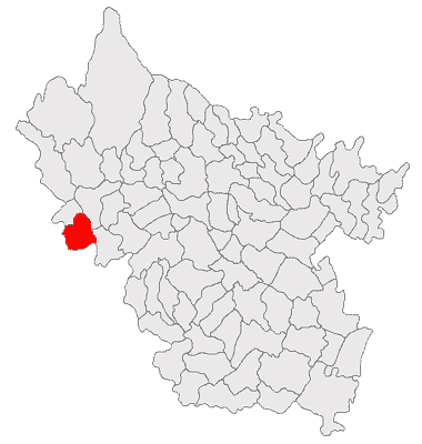 Categorie:Hărţi ale judeţului Buzău